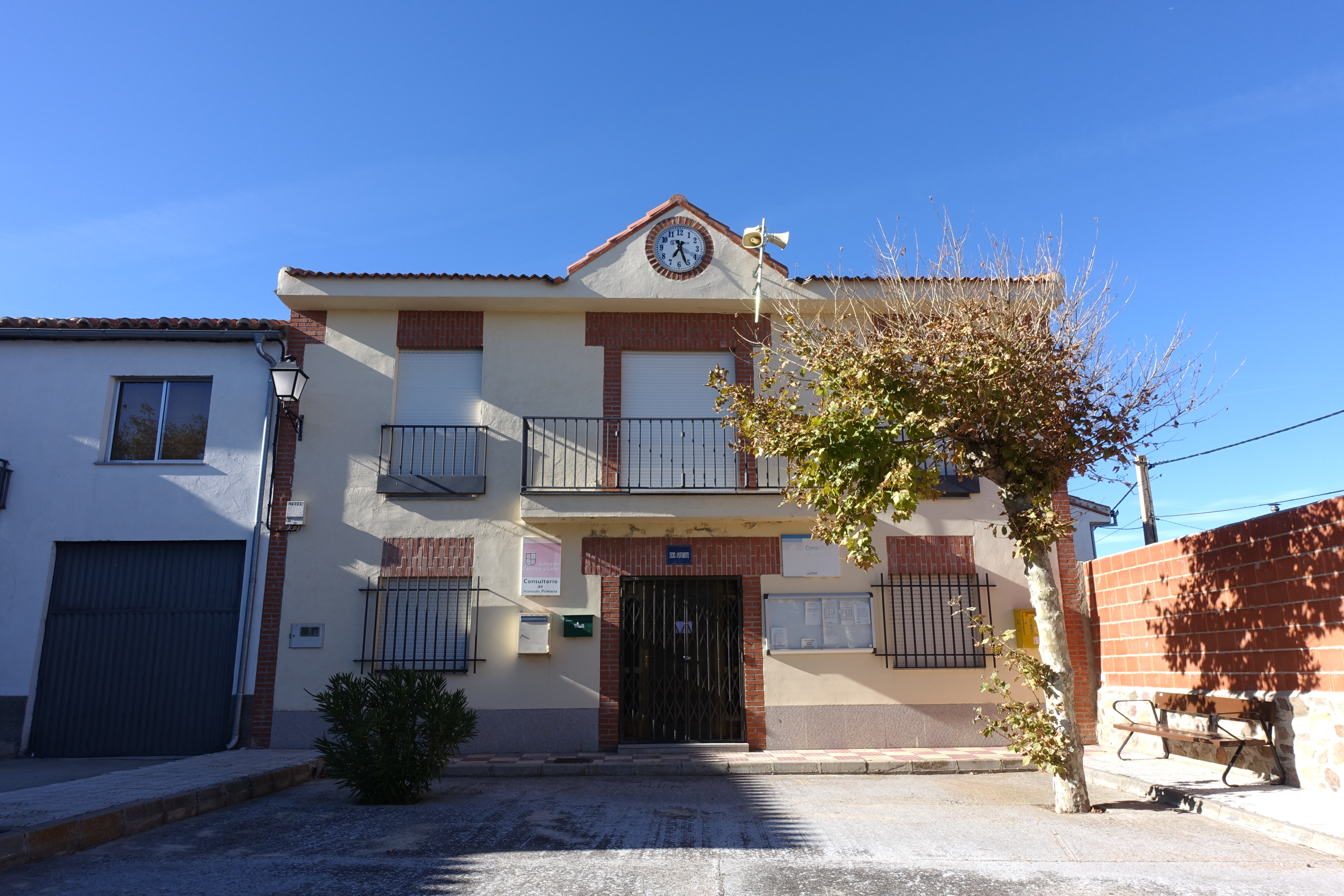 Casa consistorial de Muñogrande (Ávila, España).